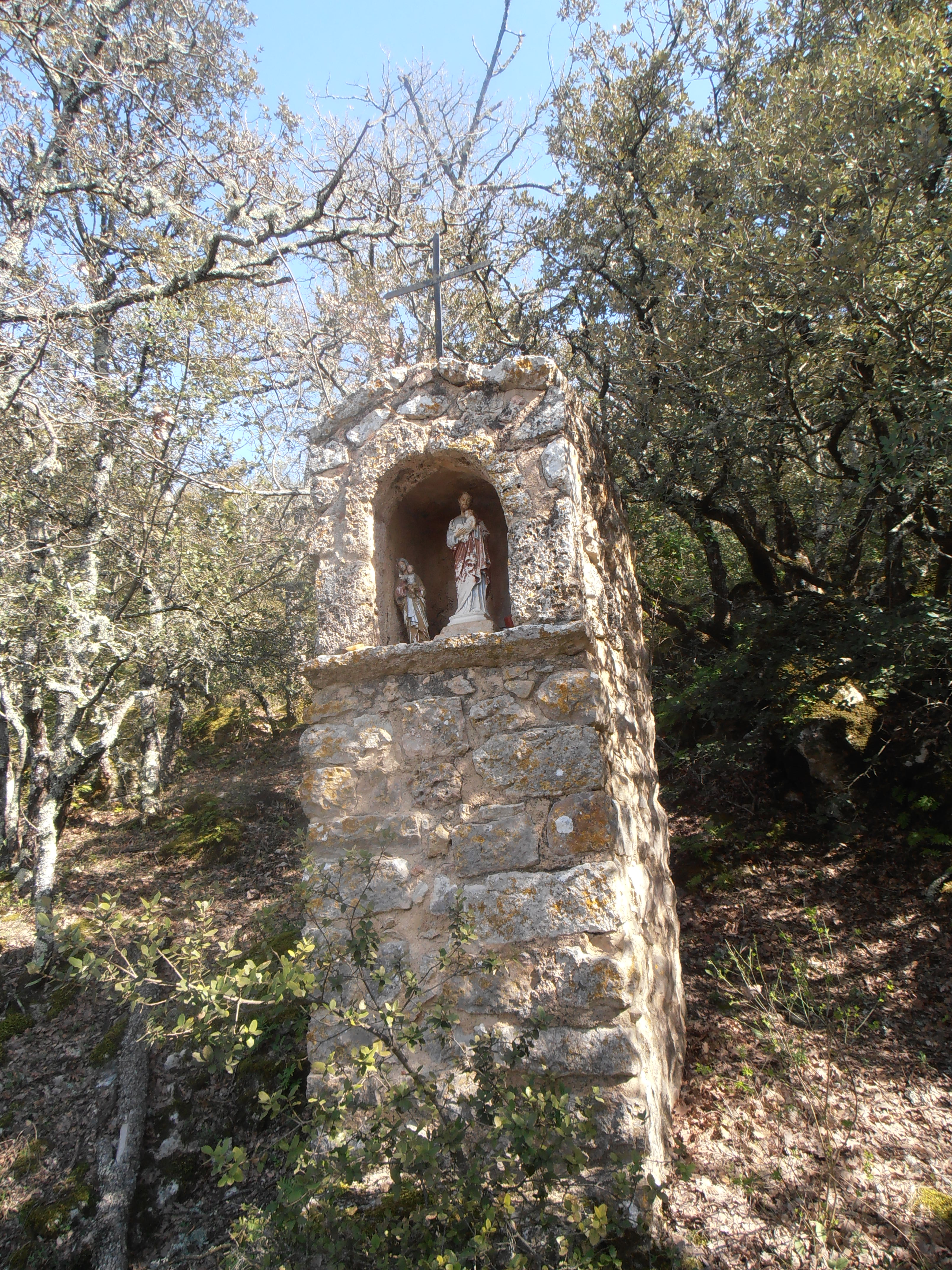 Var, Fox-Amphoux, oratoire